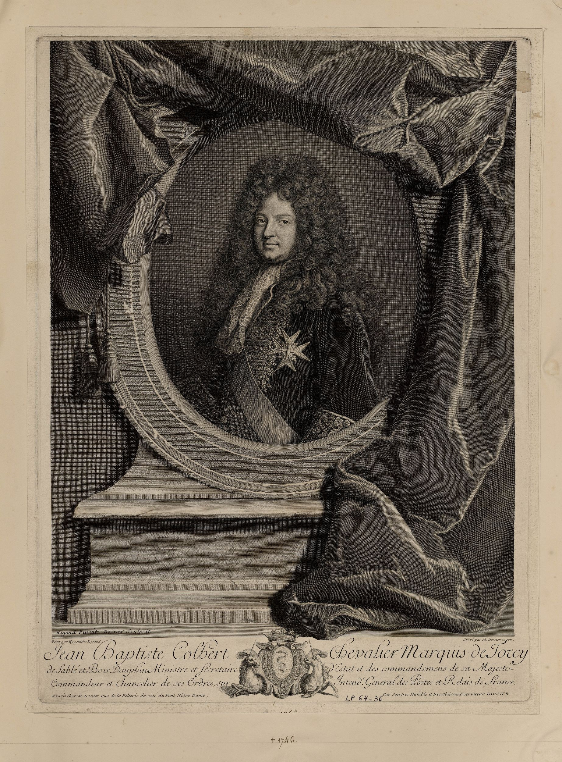 Portrait de Jean-Baptiste Colbert gravure par Michel Dossier d'après une peinture de Hyacinthe Rigaud.